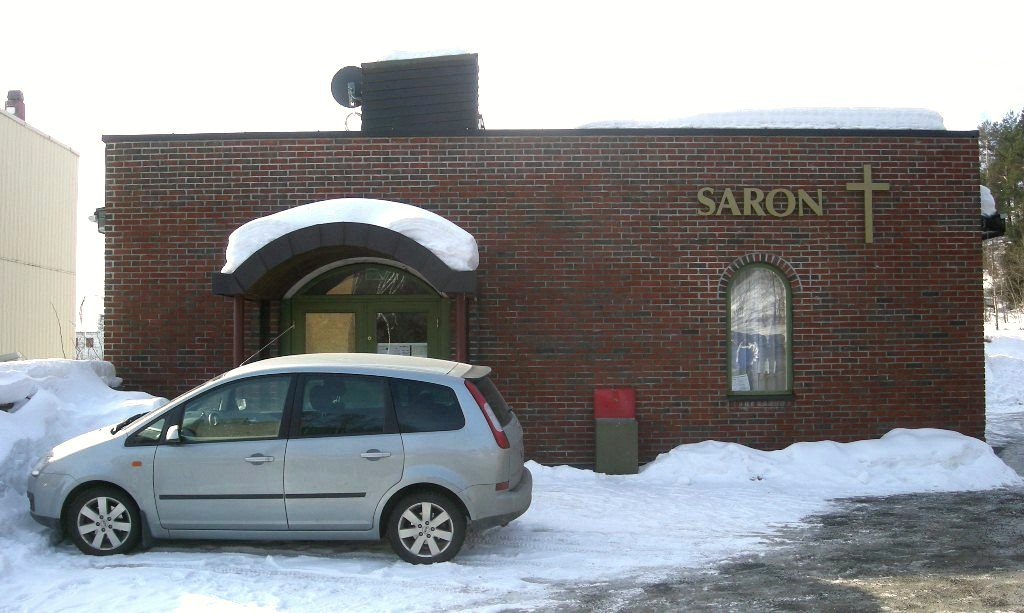 Saron Groruddalen